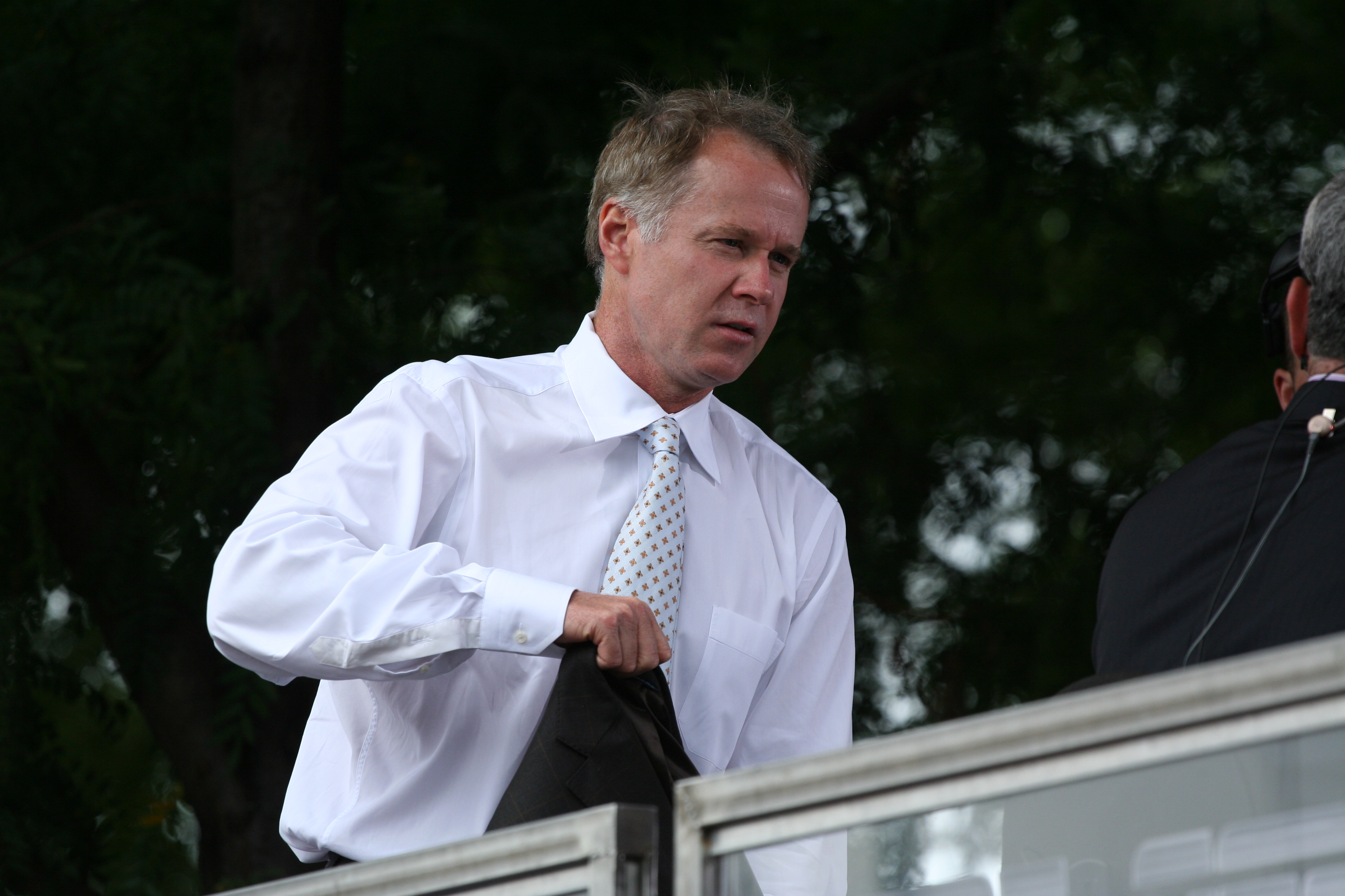 U.S. Open Wednesday, Sept. 9, 2009